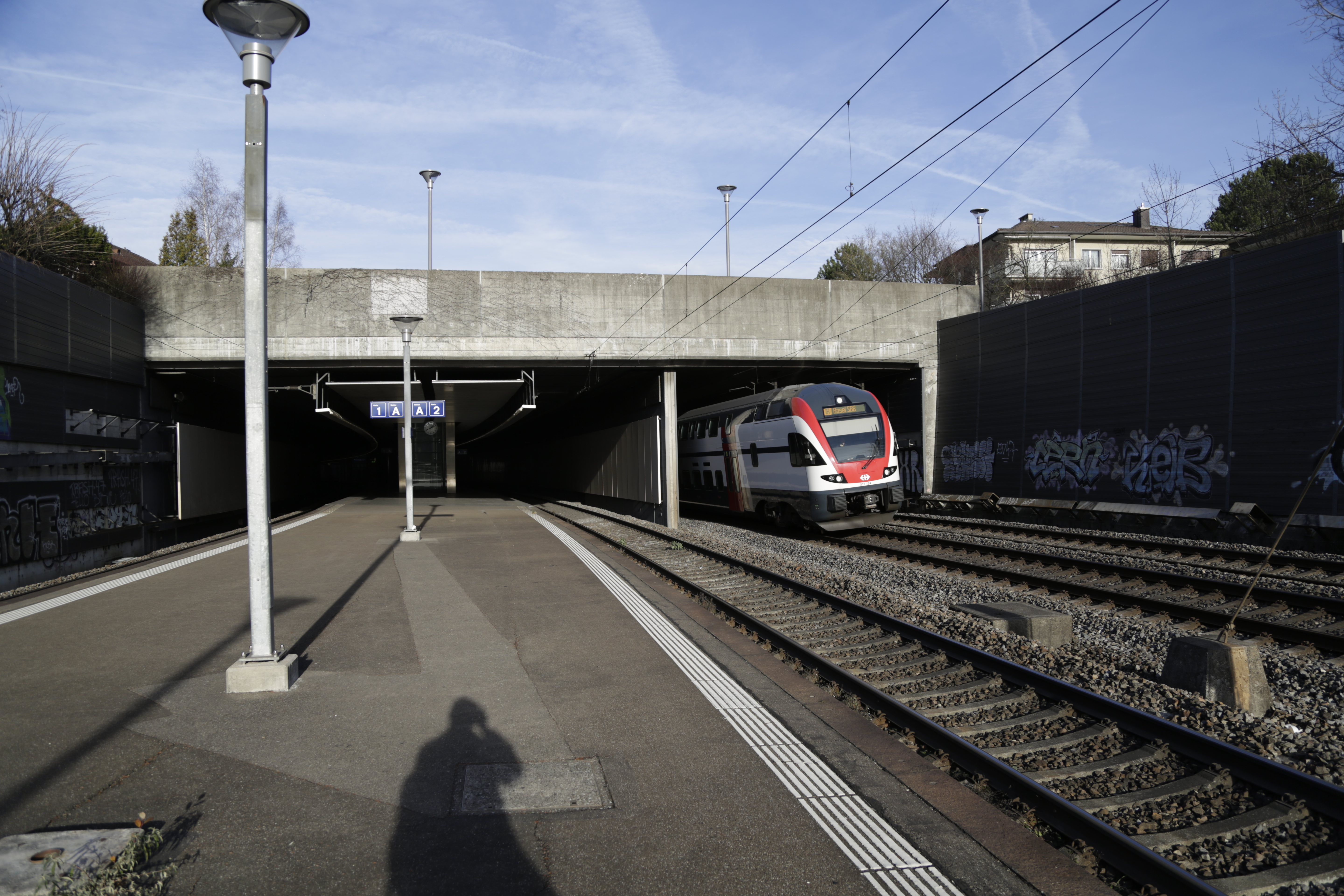 Impressionen von der Haltestelle Opfiokon.